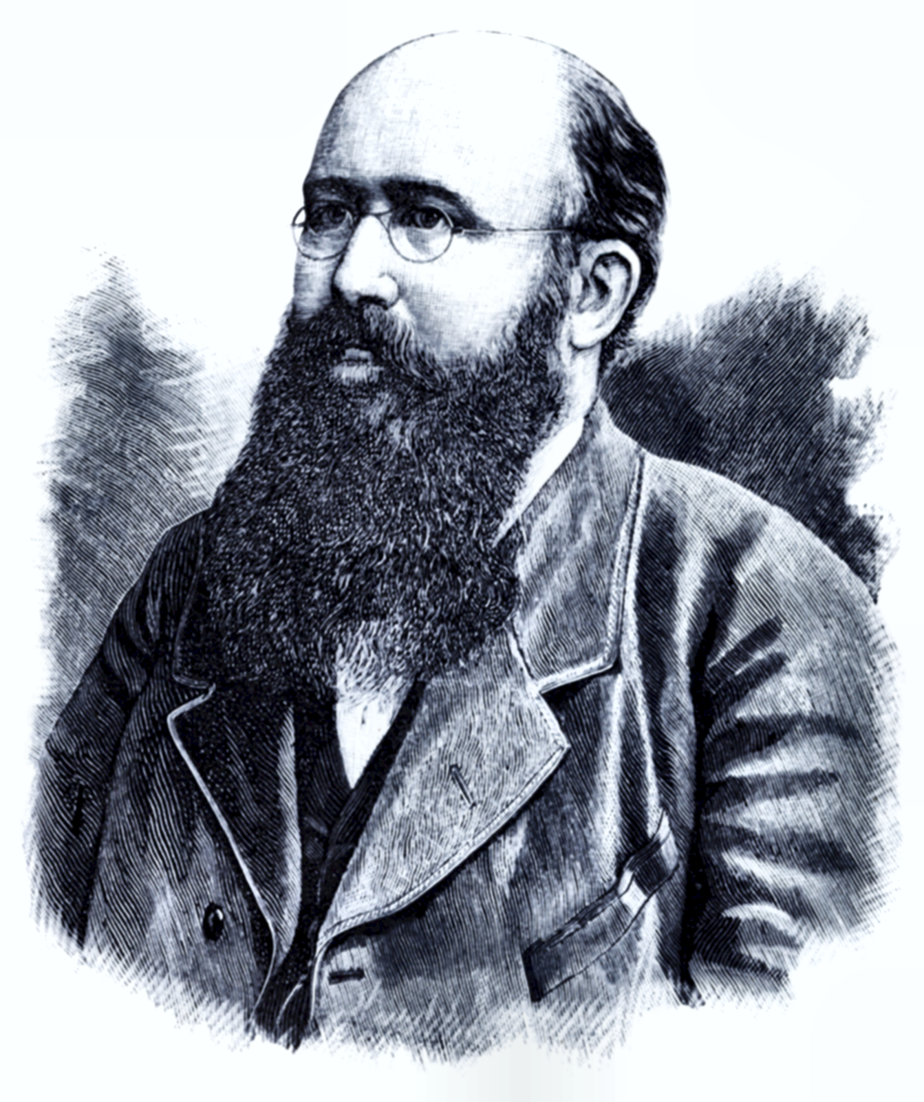 Otto Kuntze (1843-1907), Anno 1889